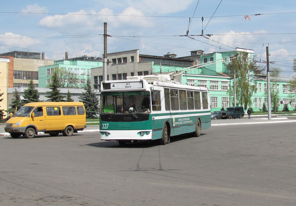 Мегаполис в Воронеже